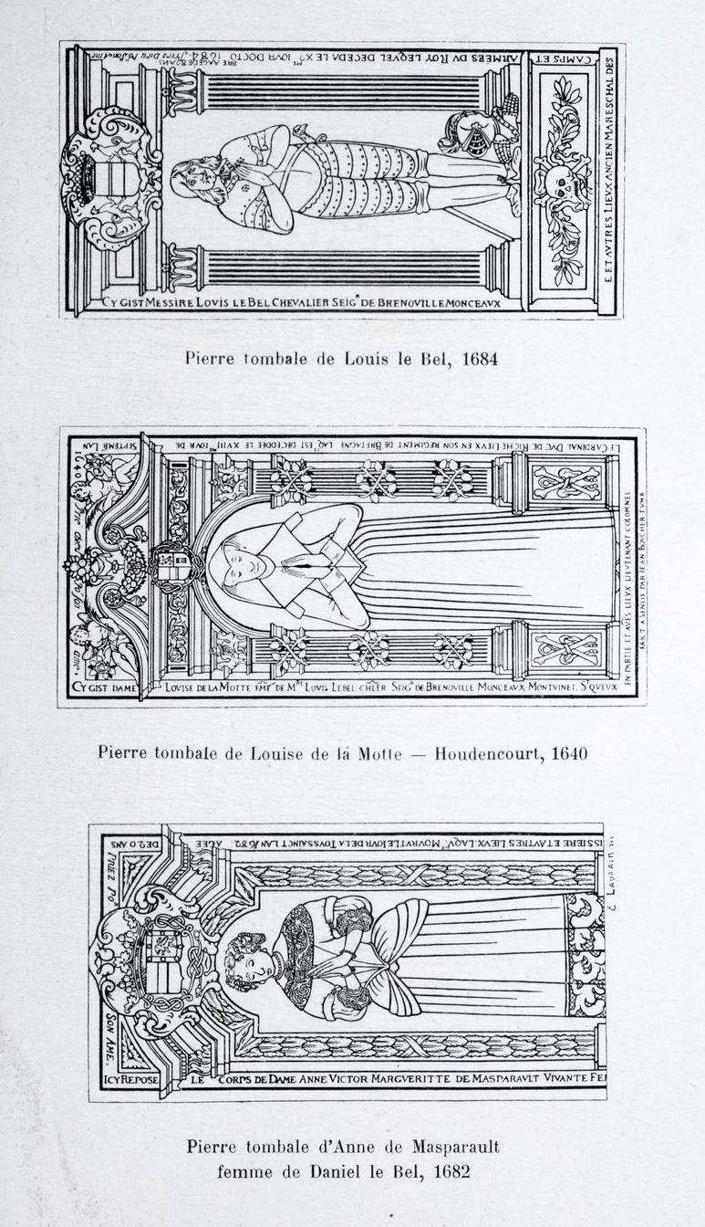 Dalles funéraires à effigie gravée de Louis Le Bel (1684), Louise de La Motte (1640) et Anne de Masparault (1682), devant l'autel de la chapelle du Rosaire.